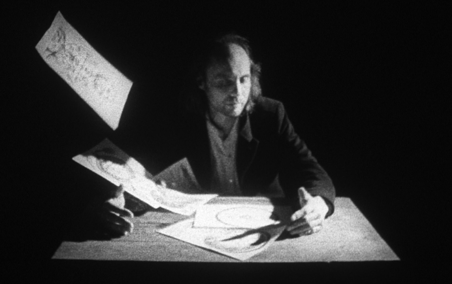 Klaus Weingarten in "Morgenröte im Aufgang" am Tisch (Film Still)